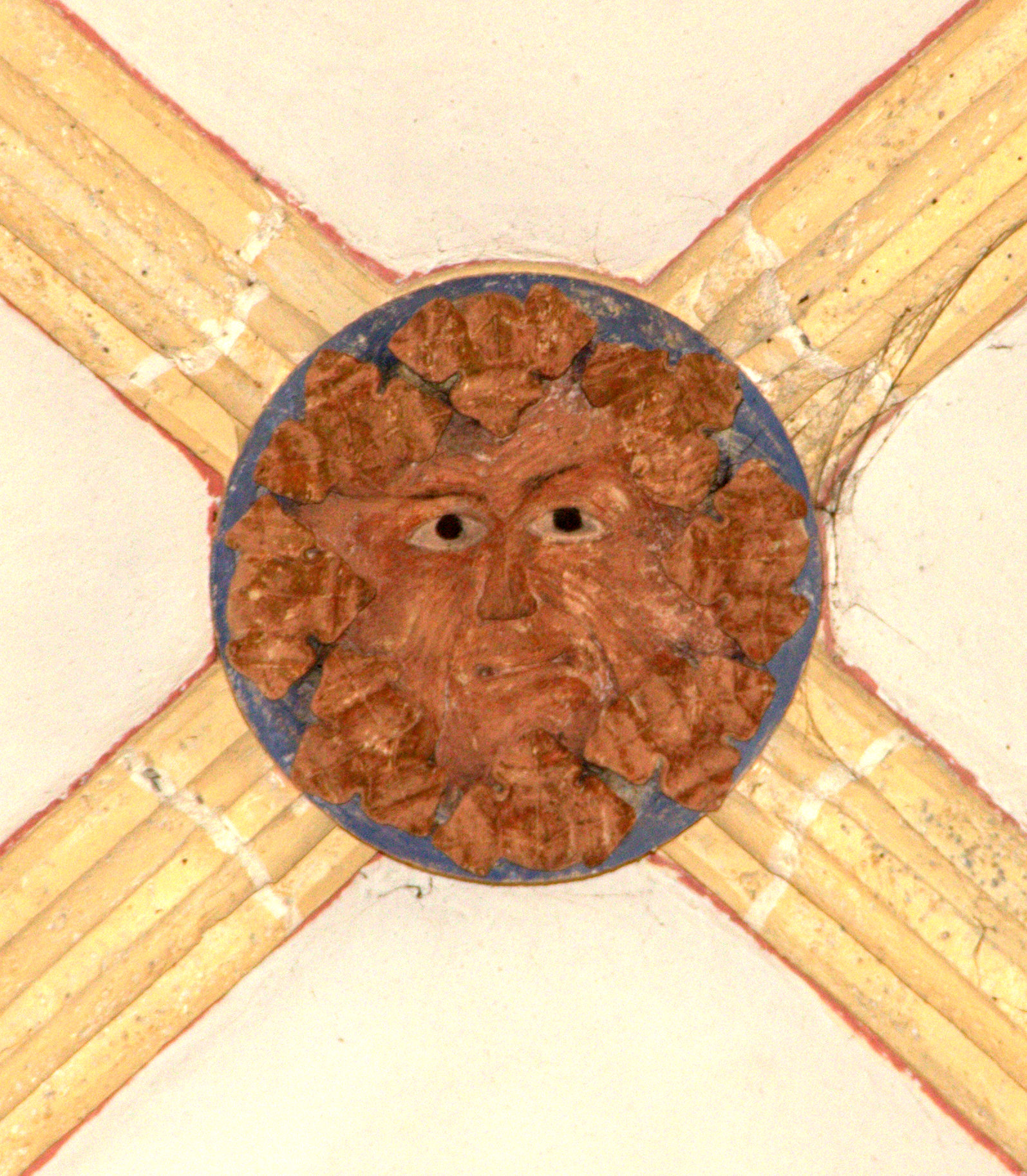 Kath. Pfarr- und Wallfahrtskirche hl. Maria Pöllauberg